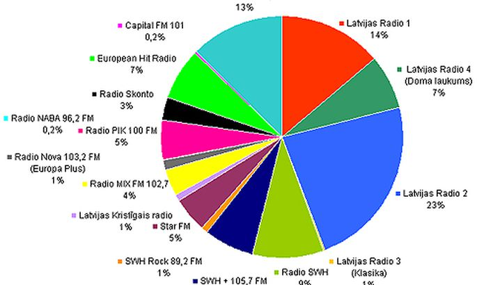 Популярное радио 2004 года в Латвии, включая: Capital FM; EHR; Radio Skonto; Radio PIK; Radio Nova(EP); Все части Latvijas Radio; Radio Mix FM; Latvijas Kristīgais Radio; Star FM; 3 части SWH; 13% - другие